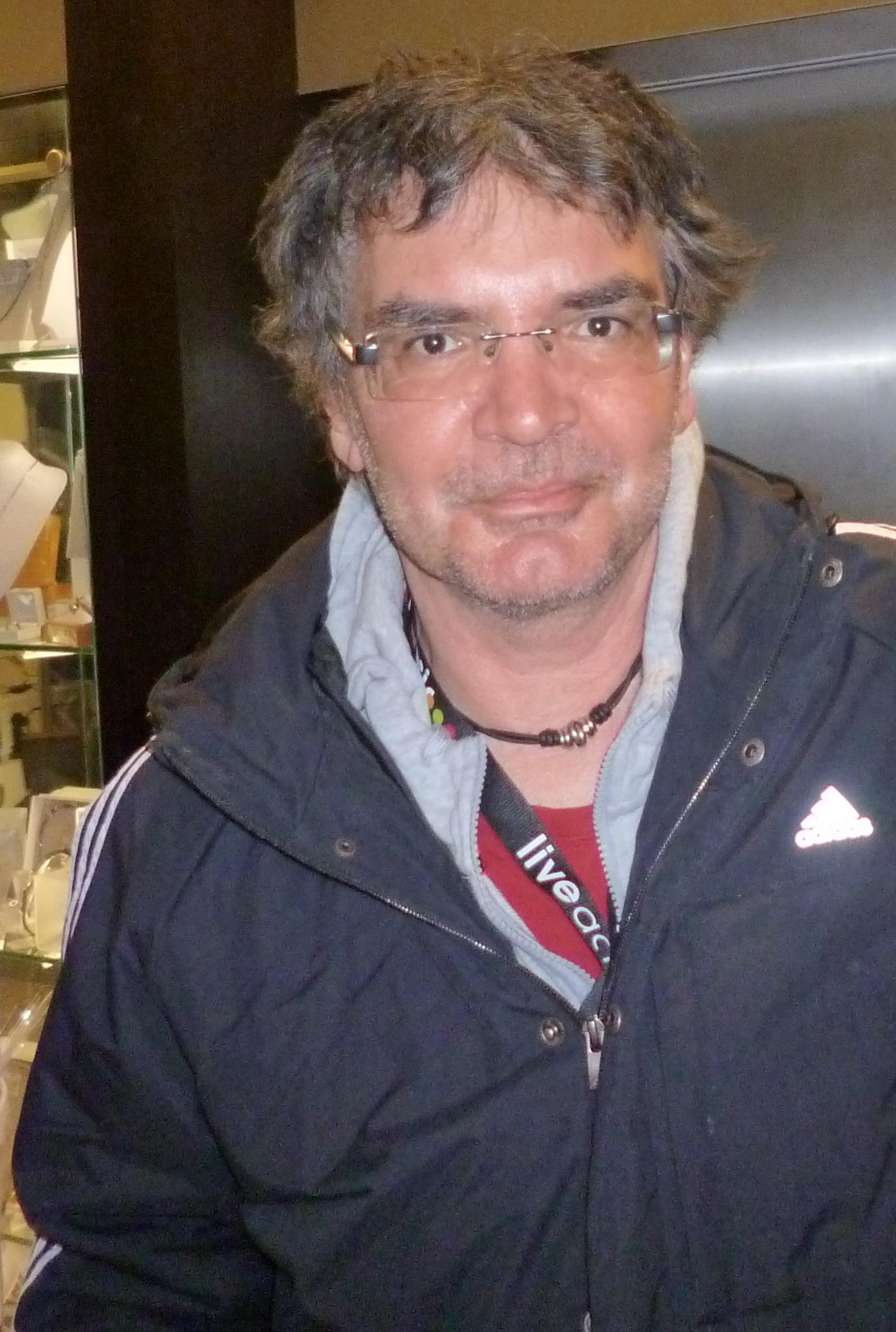 Ingo Reidl, Mitglied der Band Pur